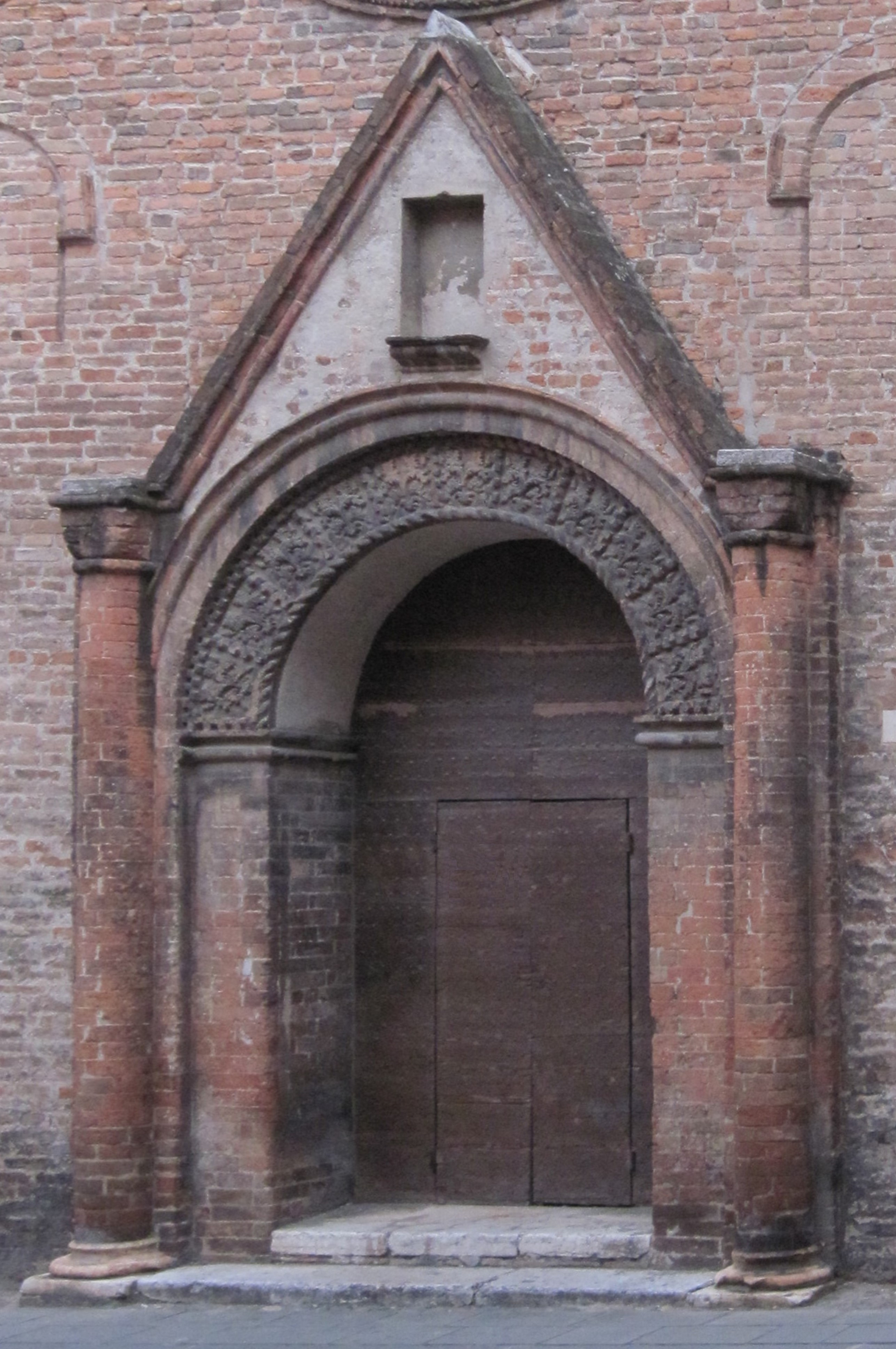 Portale ex chiesa di San Giacomo in piazzetta di via del Carbone